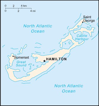 Karte Bermuda; Quelle: CIA World Factbook